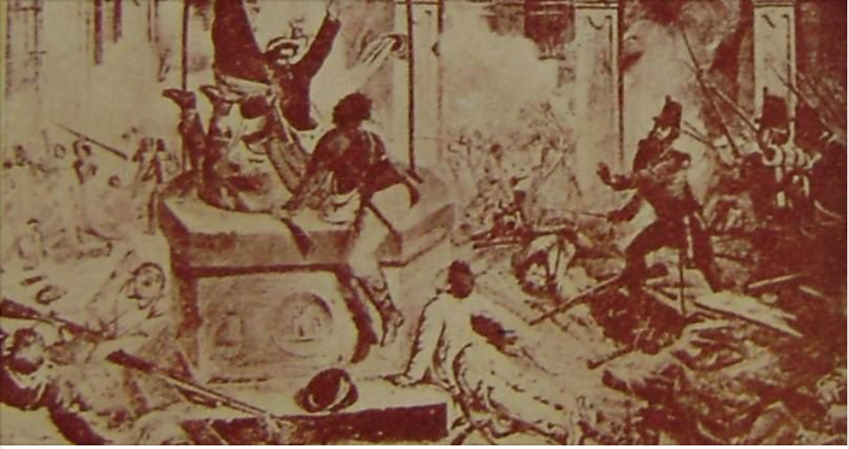 Camiciotti messinesi durante l'ultima battaglia in difesa di Messina 1848